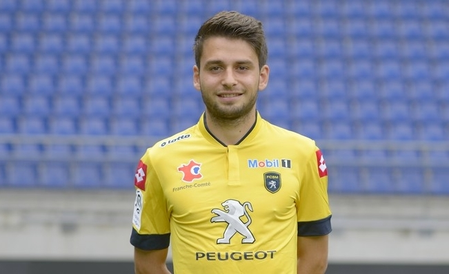 Sanjin Prcić lors de la photo officiel du fc sochaux-montbeliard pour la saison 2012 2013